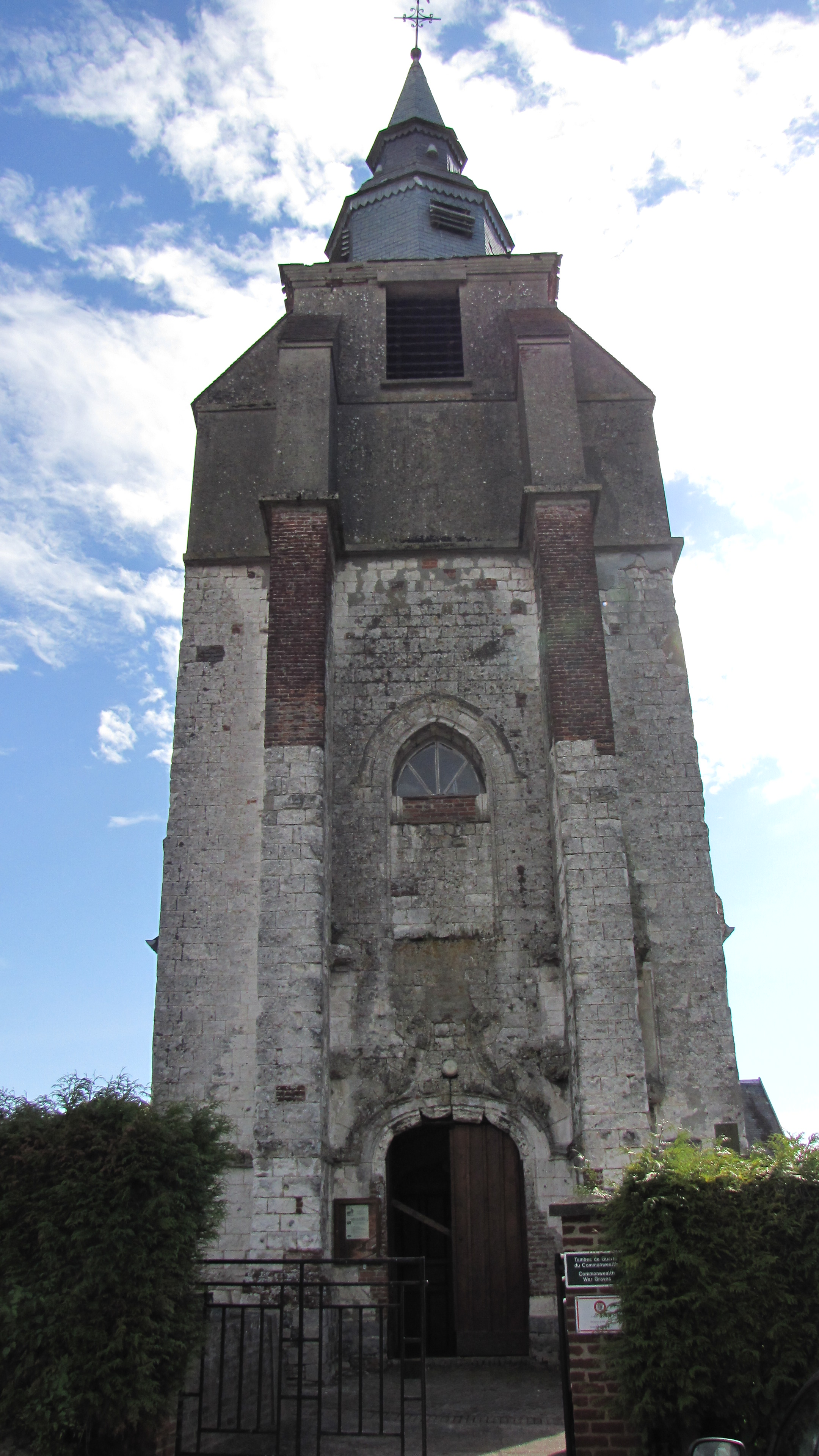 Le clocher d'Huby-Saint-Leu